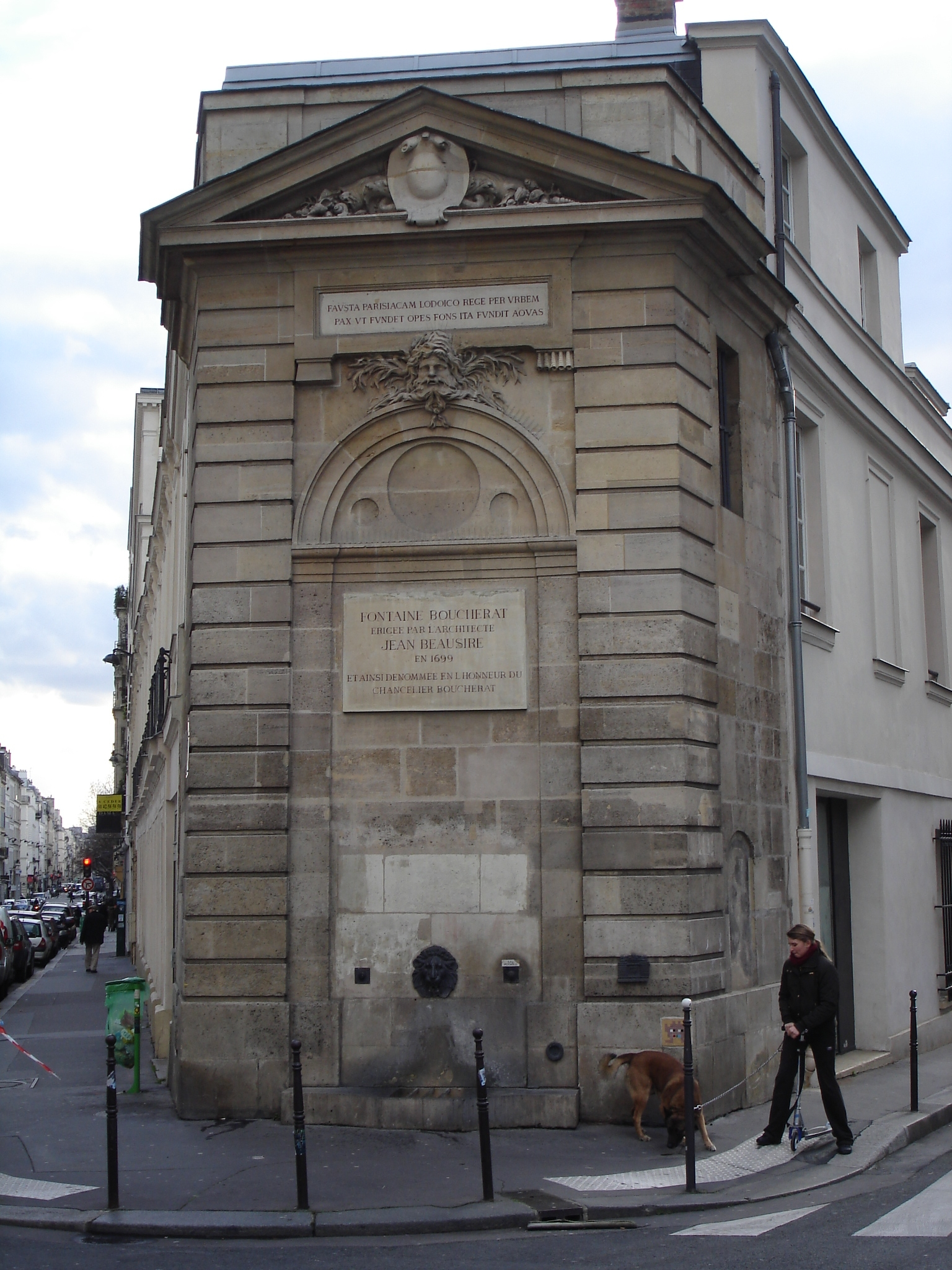 Fontaine Boucherat, rue de Turenne, Paris. General view